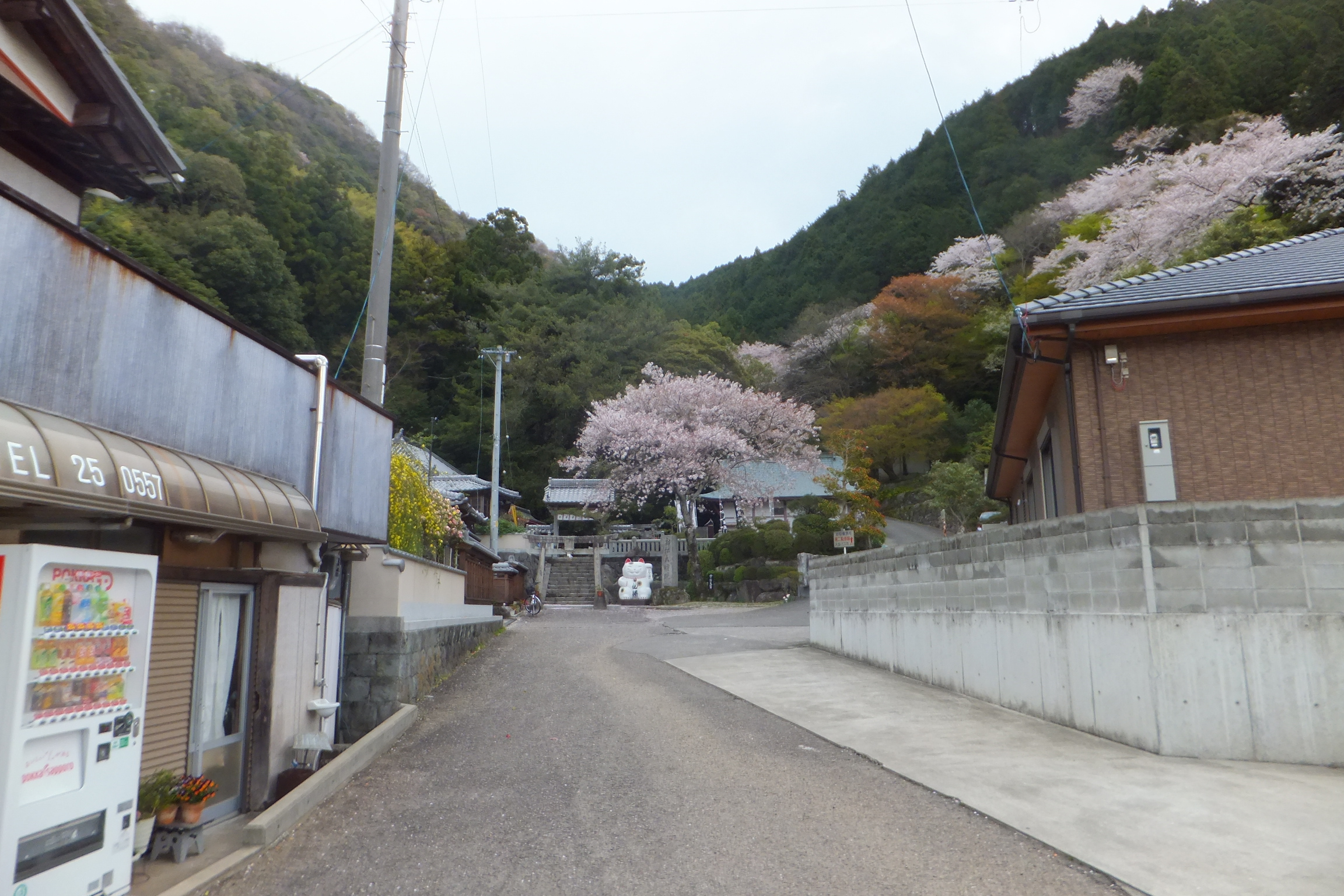 お松大権現 2014年4月4日